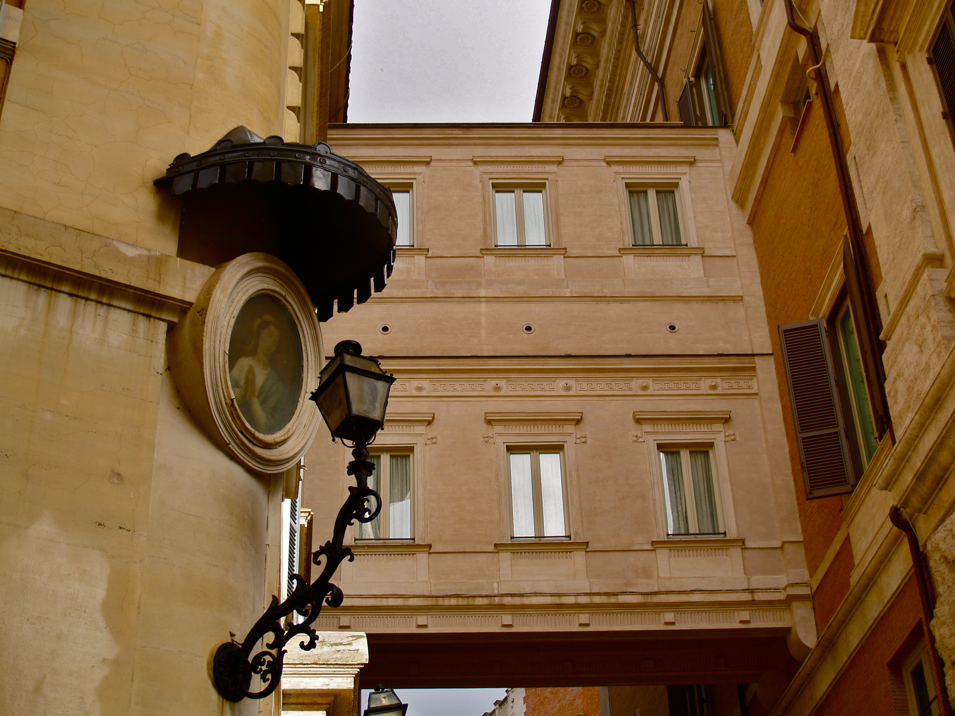 Piazza di Monte Citorio